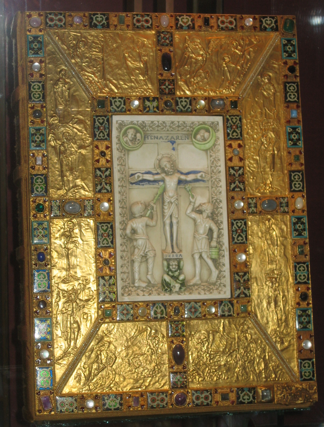 Prachtaband vum Codex Aureus Epternacensis (Facsimile)